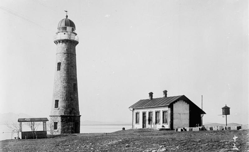 Tsingtau, Leuchtturm China, Tsingtau Leuchtturm